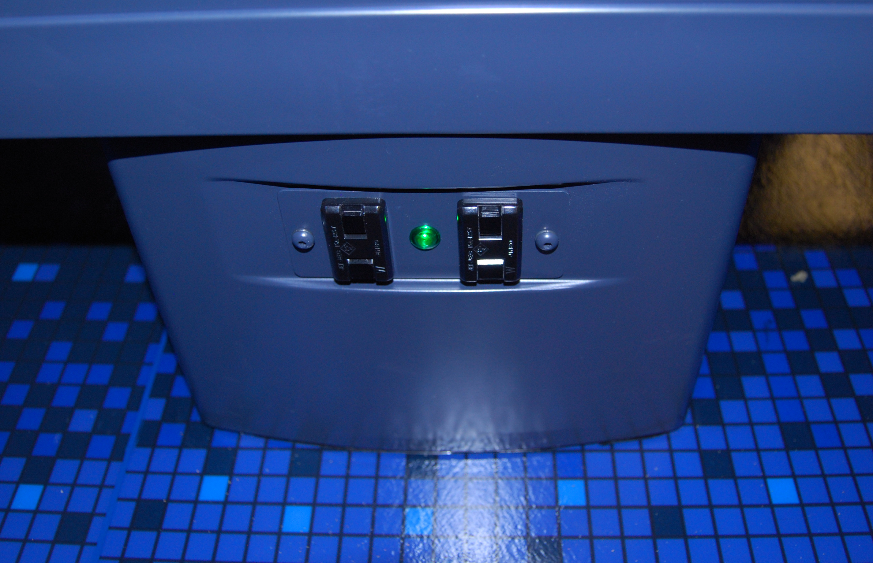 AE系（2代）座席下にあるコンセント